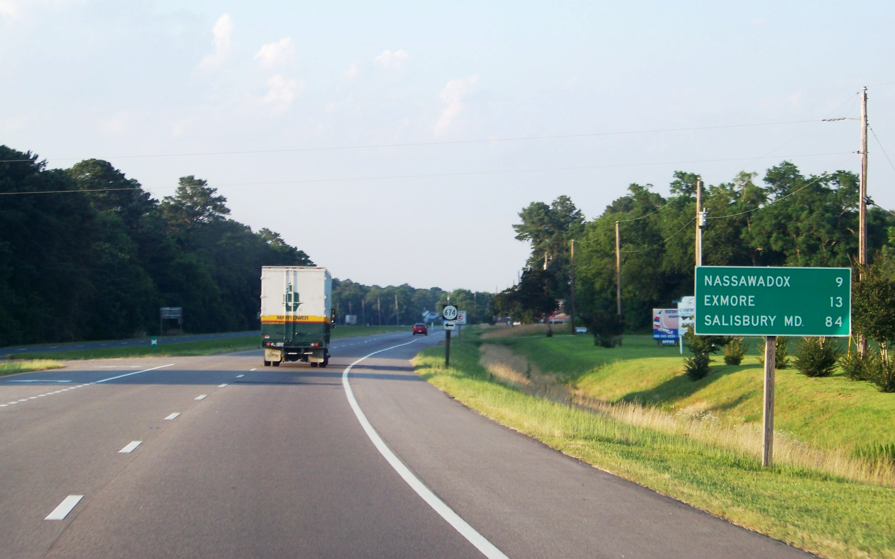 3, VA, USA